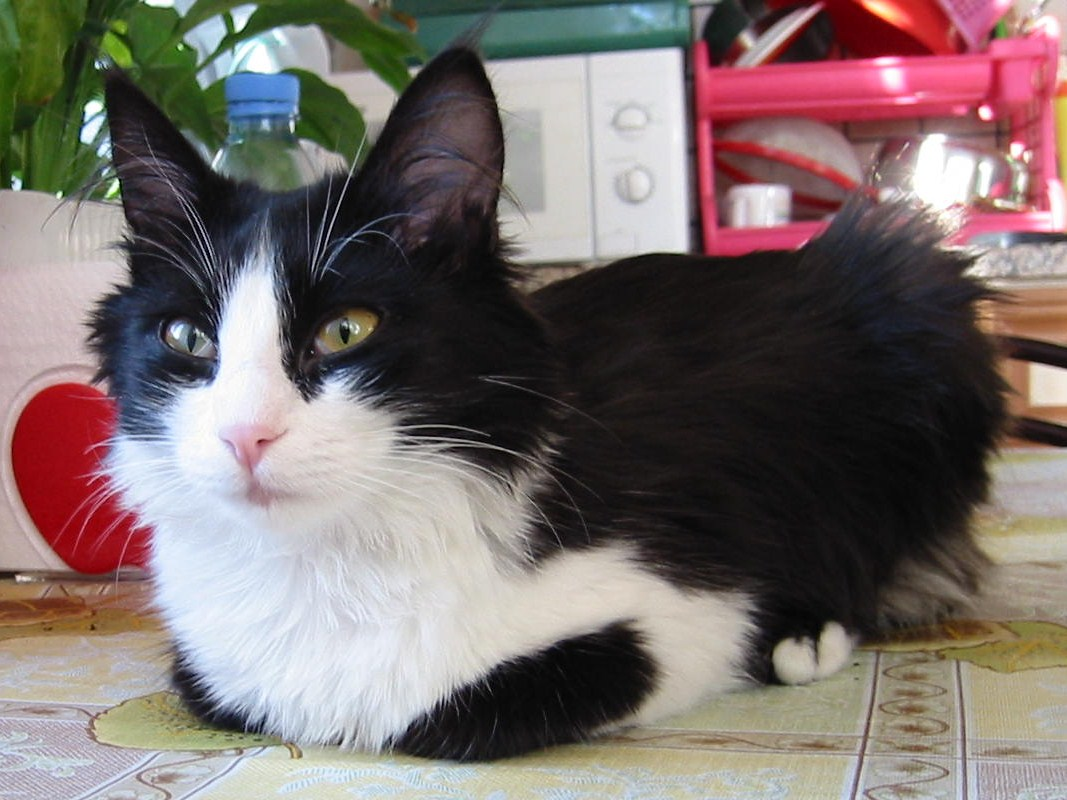 Tua-Asena